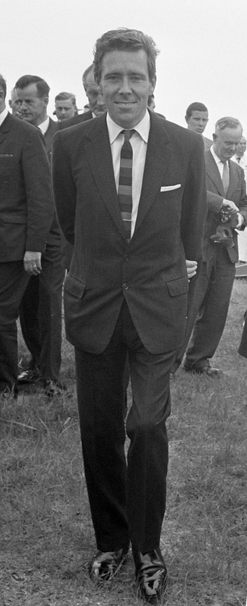 Prinses Margaret , Lord Snowdon en Prins Bernhard in de Hoovercraft, Prinses Margaret , Lord Snowdon en Prins Bernhard